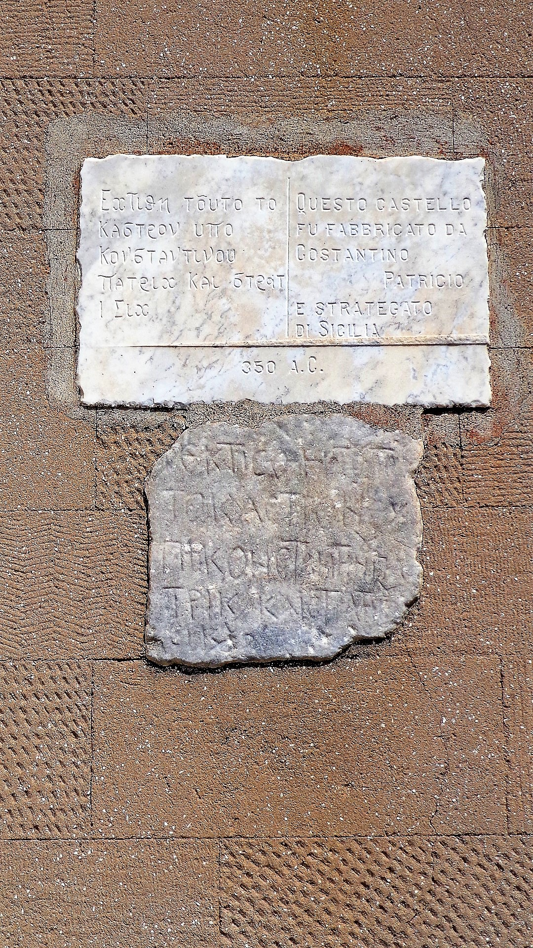 Targhe.